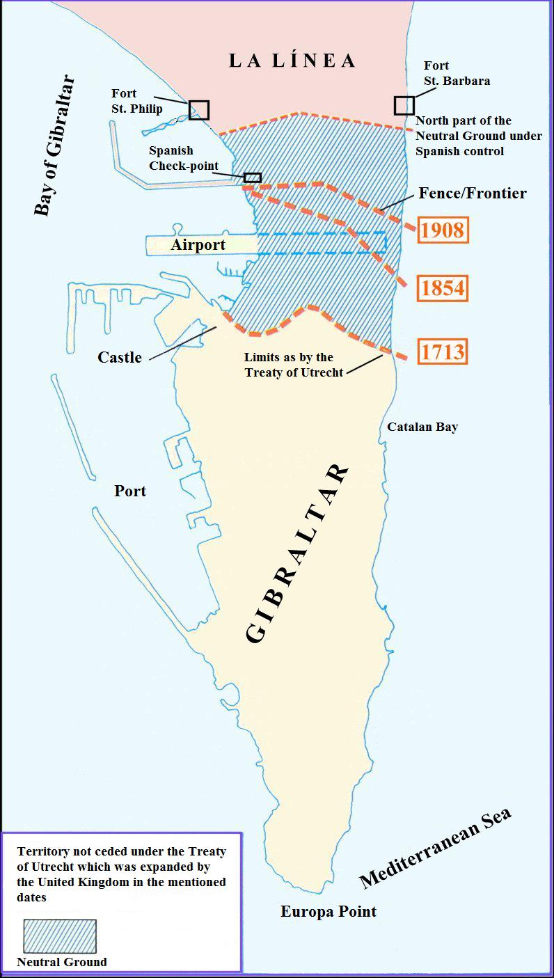 O Campo Neutral de Xibraltar na actualidade, conforme ao Tratado de Utrecht